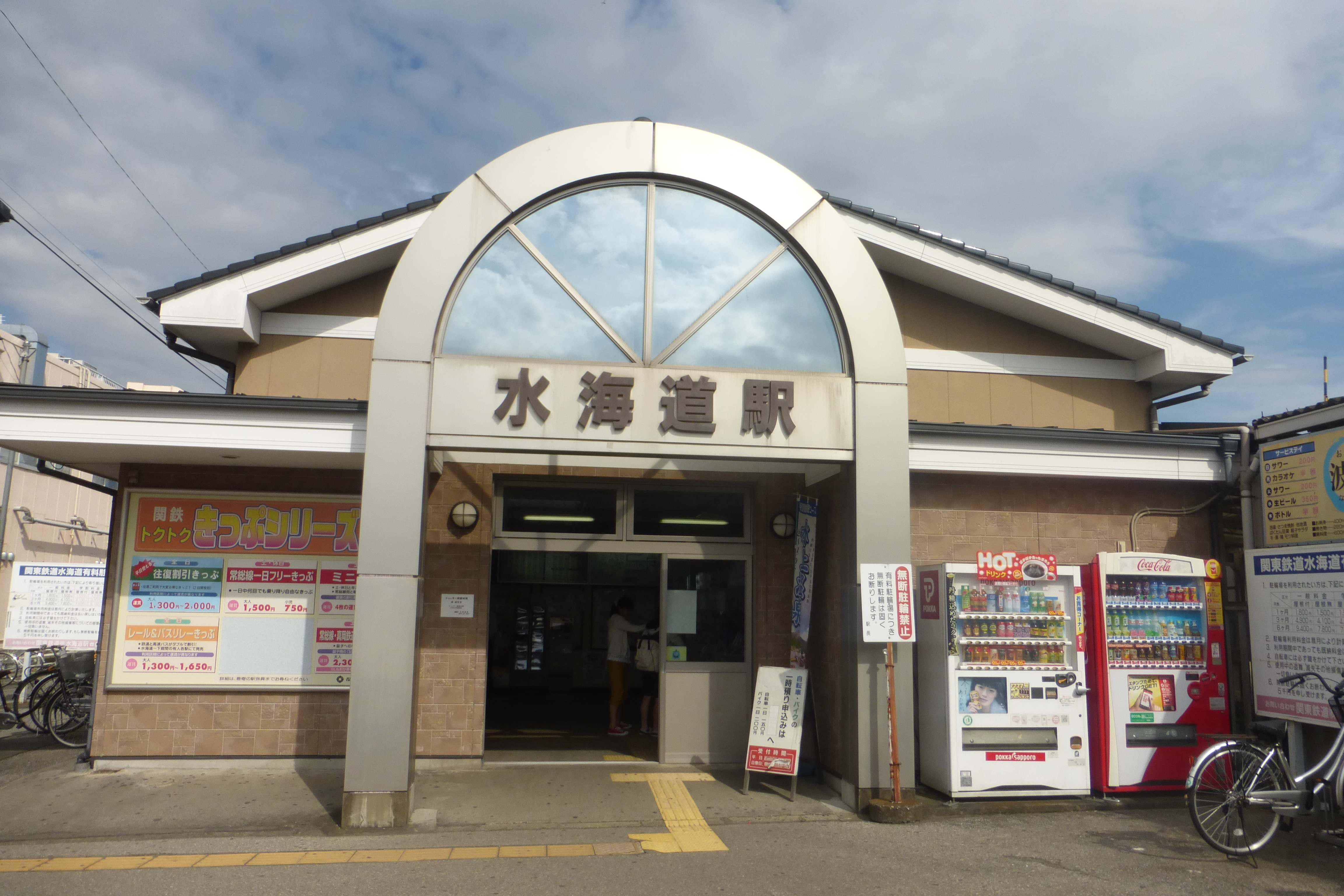 Mitsukaidō Station (水海道駅)